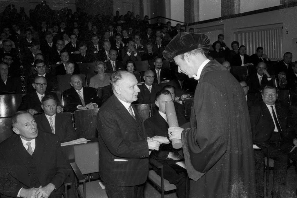 im Hörsaal CAP 3. Der Dekan der Rechts- und Staatswissenschaftlichen Fakultät Prof. Dr. Christian-Friedrich Menger überreicht die Urkunde an Prof. Dr. Paul Guggenheim aus Genf. Im Bild links Ministerpräsident Helmut Lemke (1.v.l.)